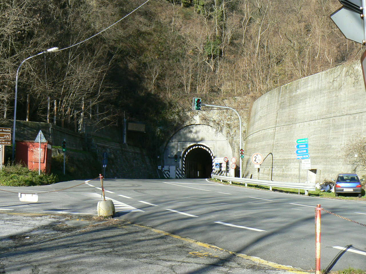 L'imbocco, lato mare, della galleria del passo del Turchino